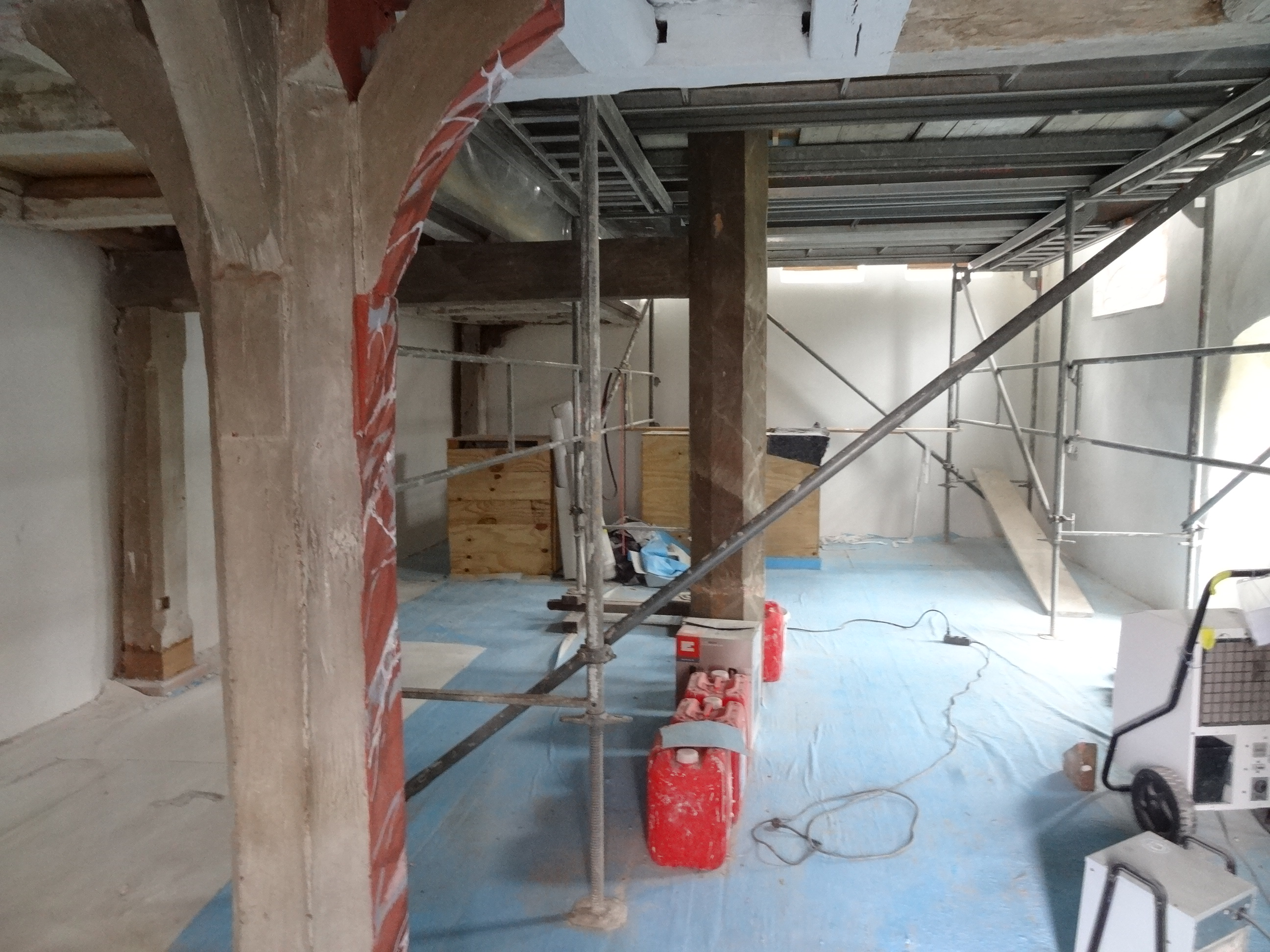 Evangelische Kirche (Unter-Lais)